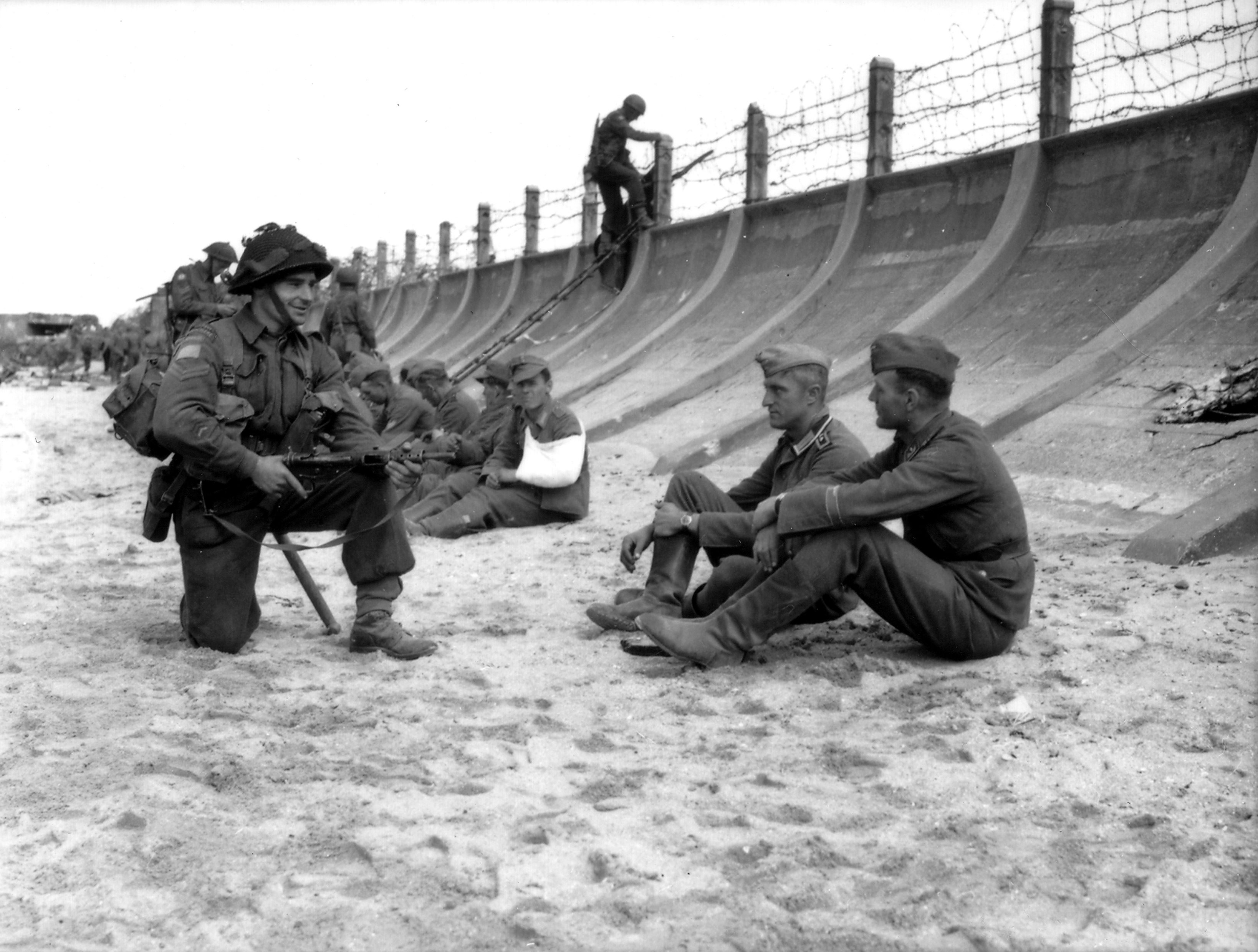 Le caporal Victor Deblois du Régiment de la Chaudière interroge accroupis deux prisonniers allemands capturés par les troupes canadiennes à Juno Beach le D Day. D'autres prisonniers sont également assis le long du mur anti-char.